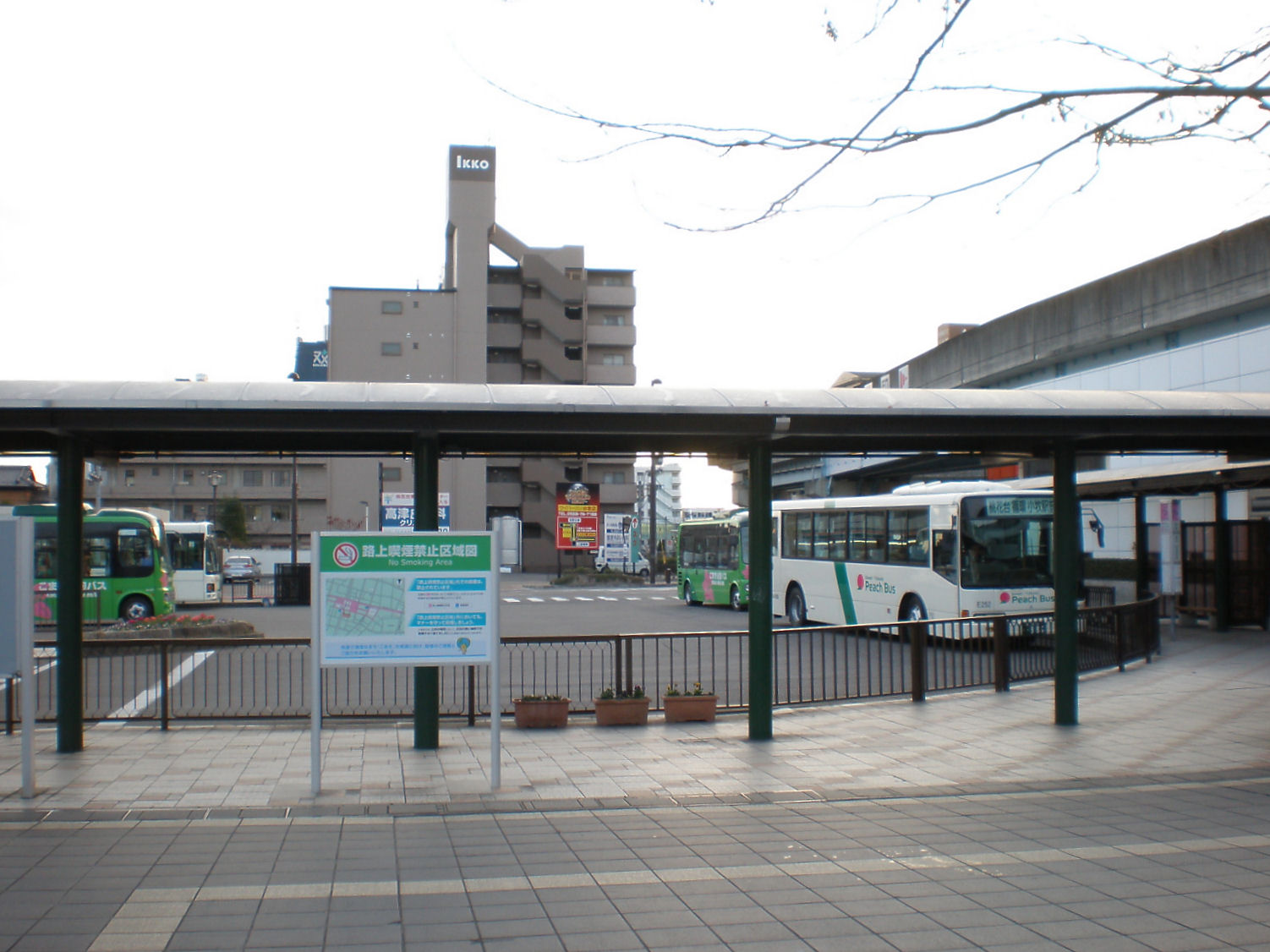 愛知県小牧市にある小牧駅バスターミナル